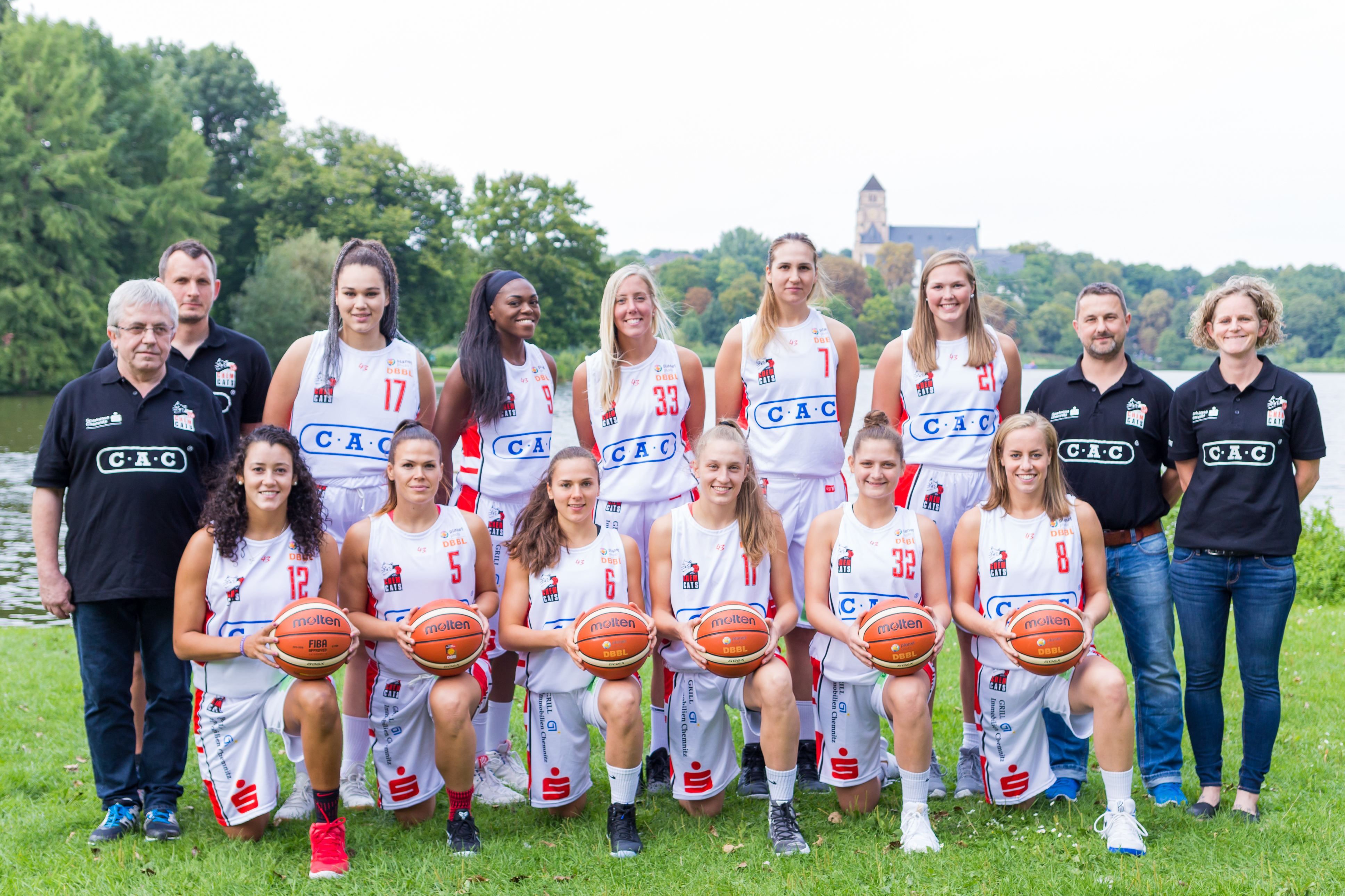 Basketball, 1. Damen-Basketball-Bundesliga, ChemCats Chemnitz; Mannschaftsfoto ChemCats Chemnitz; obere Reihe: Dr. Rüdiger Schulz (Teamarzt), Jan Grieshammer (Athletiktrainer), Elea Gaba (17), Abigail Asoro (9), Valerie McQuade (33), Jovana Mandic (7), Clarissa Ober (21), Andy Friedemann (Physio), Amanda Davidson (Trainerin, head coach); untere Reihe: Kendall Noble (12), Katarina Flasarova (5), Margot Vidal-Geneve (6), Lucile Peroche (11), Rebekka Kalaydjiev (32), Jacobine Klerx (8)